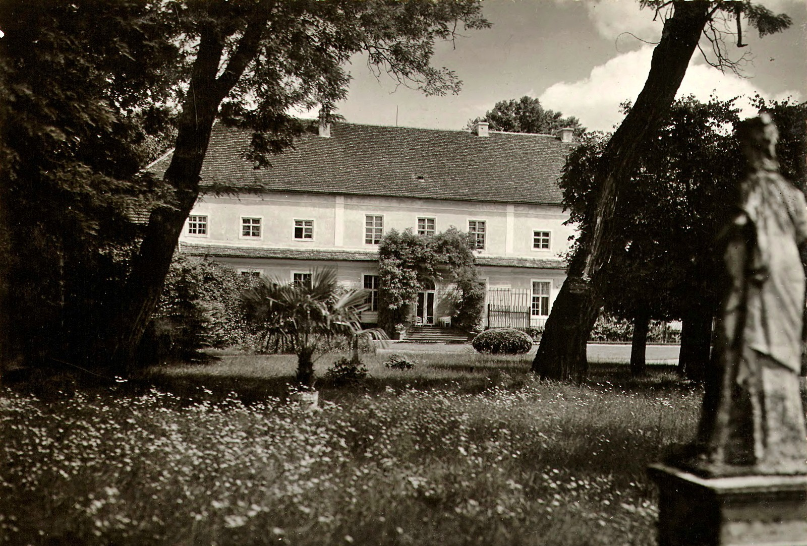 Pałac Wierzbica Górna